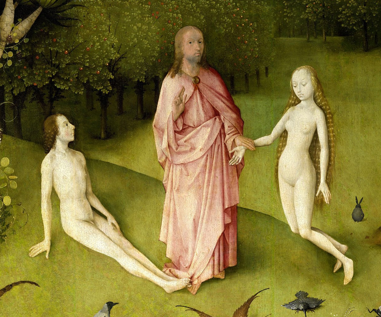 Christus, Adam und Eva. Detail aus Hieronymus Boschs Triptychon Der Garten der Lüste (linker Innenflügel mit Darstellung des Garten Eden)